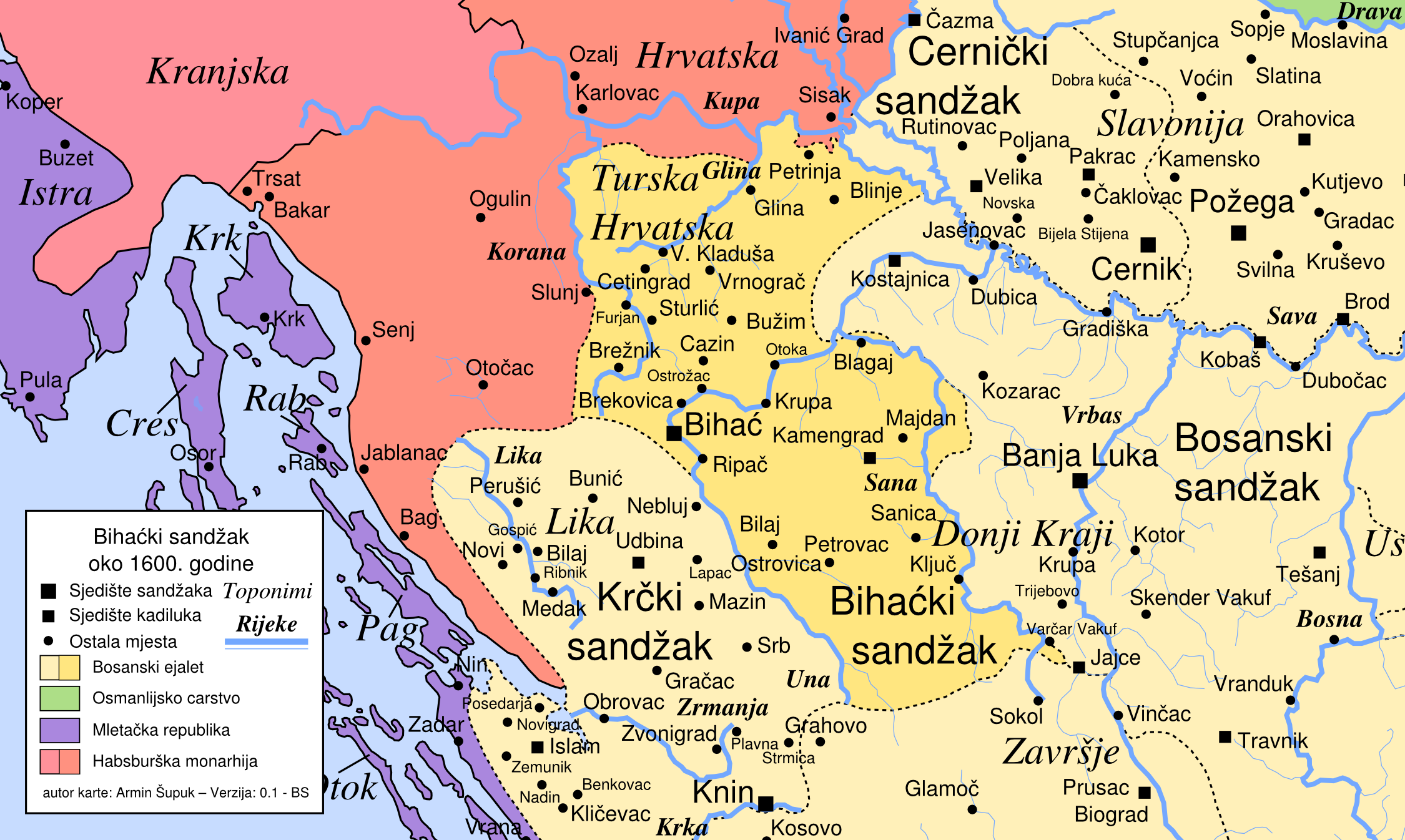 Bihaćki sandžak oko 1600. godine